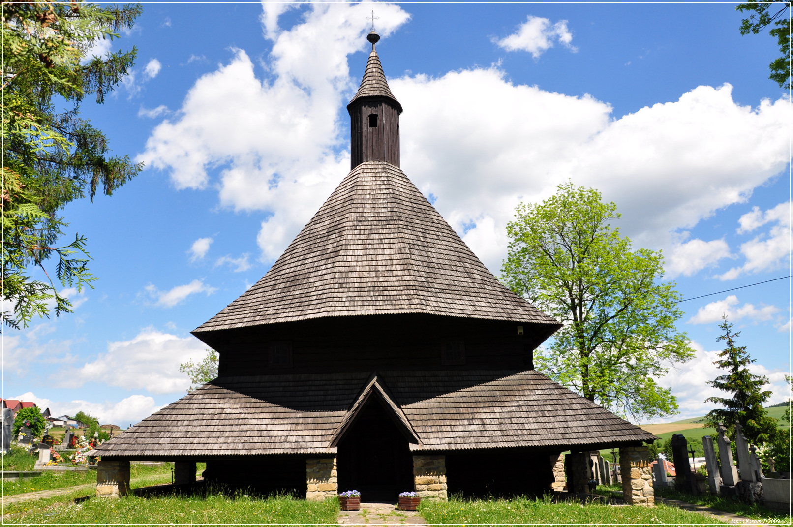 Wooden Church, Tvrdošín